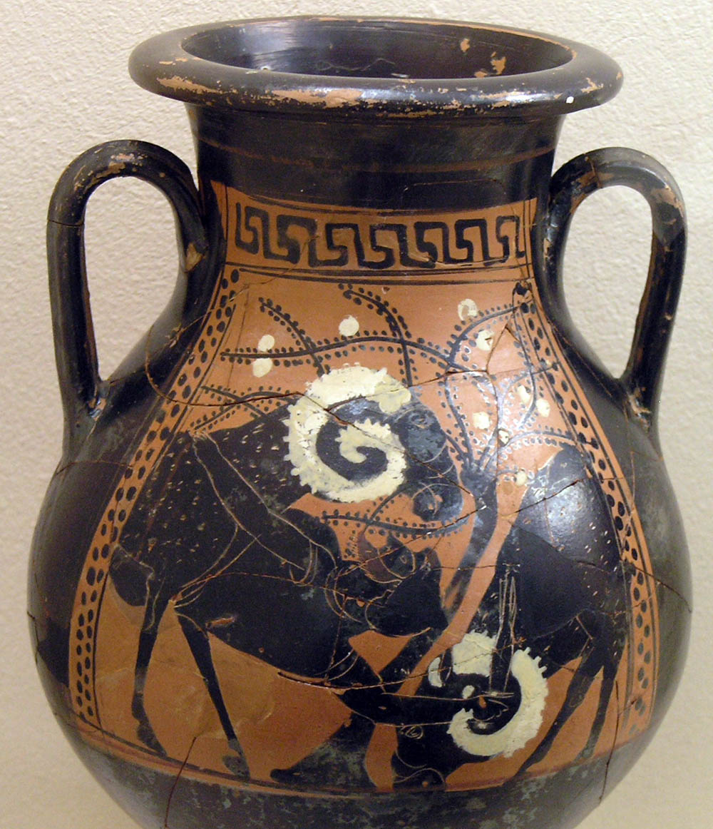 Pelikè représentant Ulysse s'échappant de la caverne de Polyphème en s'agrippant à la toison d'un bélier. Vers 500 a. C. Musée archéologique du Céramique n°THW 195.